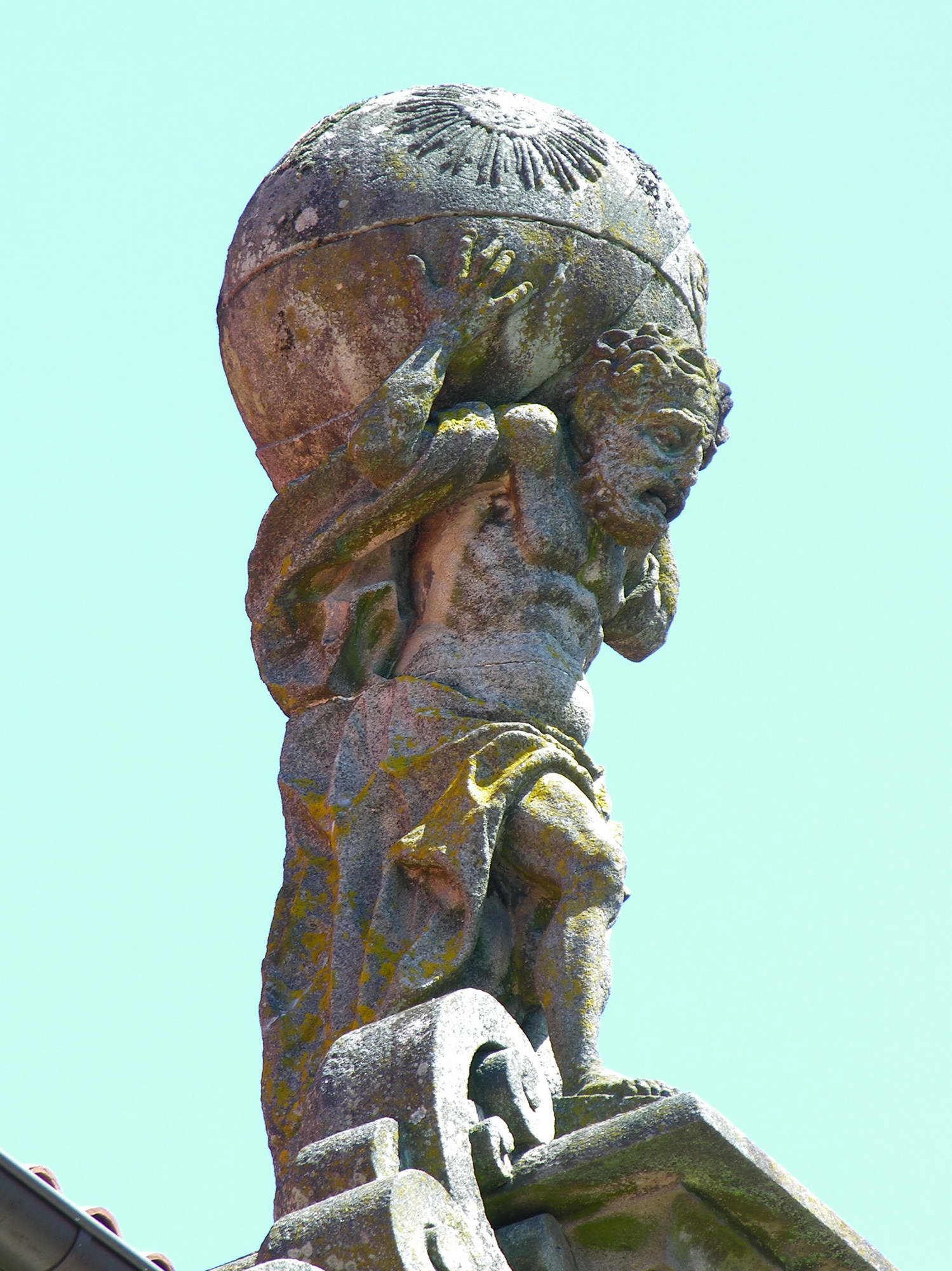 self made. Praza do Toural Santiago de Compostela, Galicia, Spain.